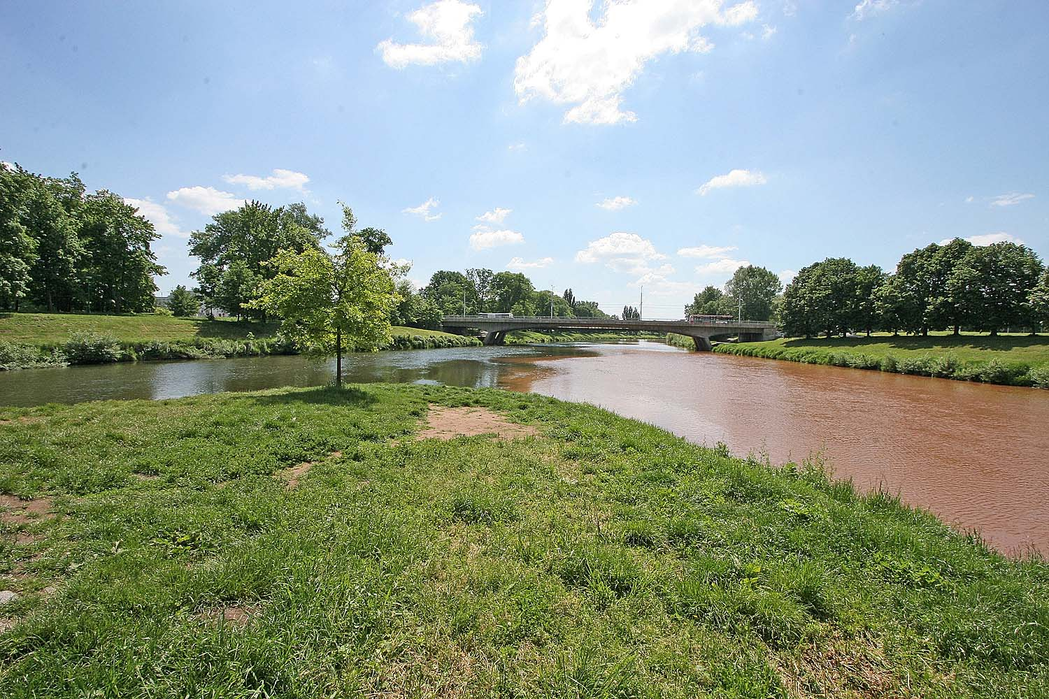 Hradec Králové - soutok Labe a Orlice (Labe je vpravo)